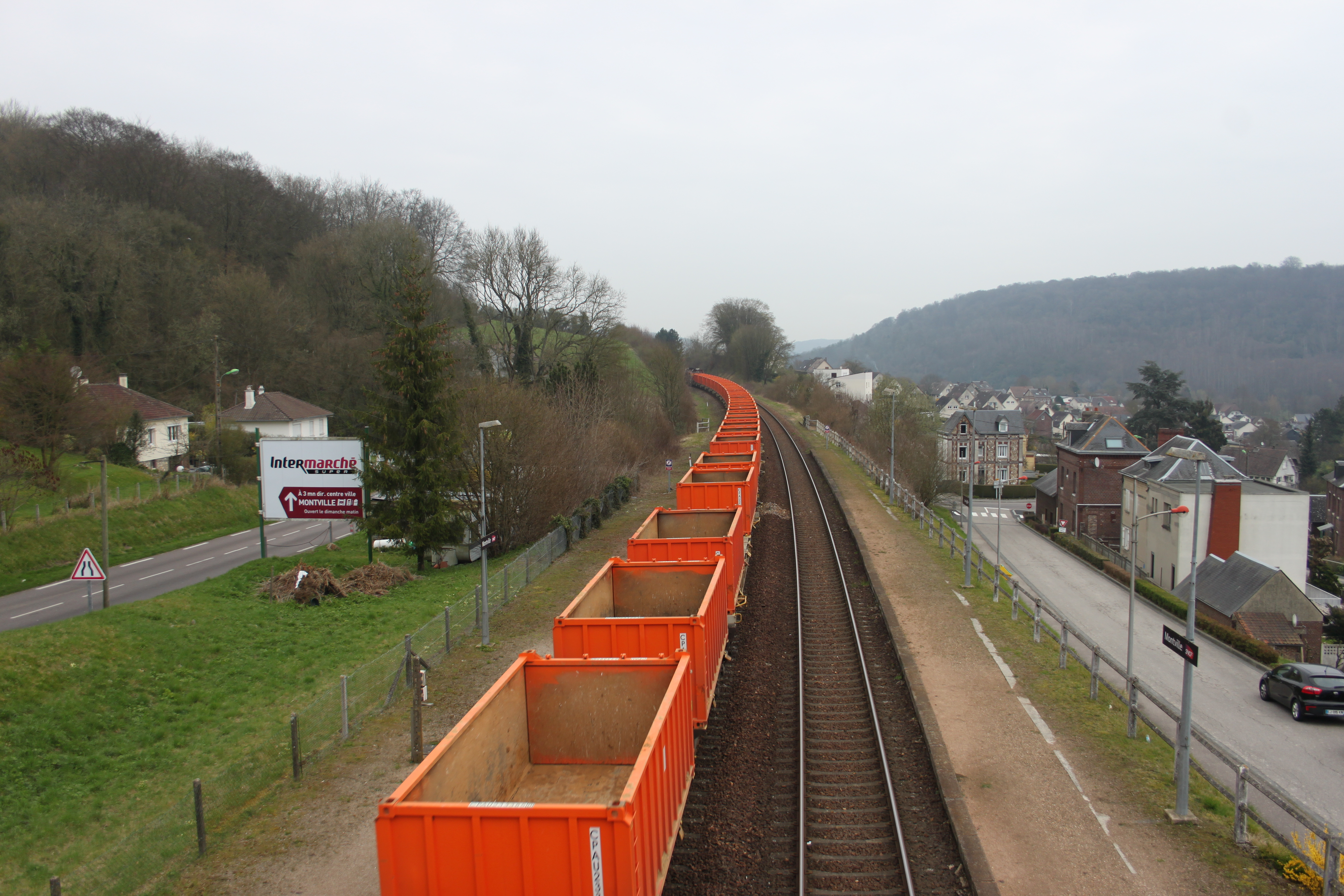 Ligne de MALAUNAY à DIEPPE, gare de Montville(76), train de wagons porte bennes ( tractés par les machines Vossloh G 1206 COLAS RAIL n°10 et 13 ) à destination de Rouxmesnil-Bouteilles (via Dieppe), afin d'y charger de la terre, pour l'aménagement du quartier Flaubert à Rouen .